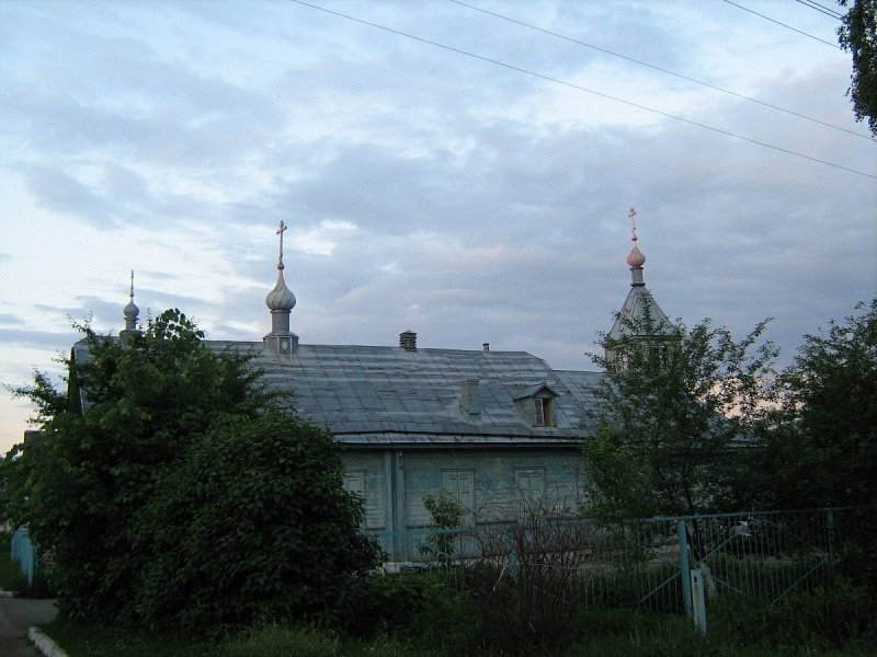 Жлобін. Храм Свяціцеля Васіля Вялікага